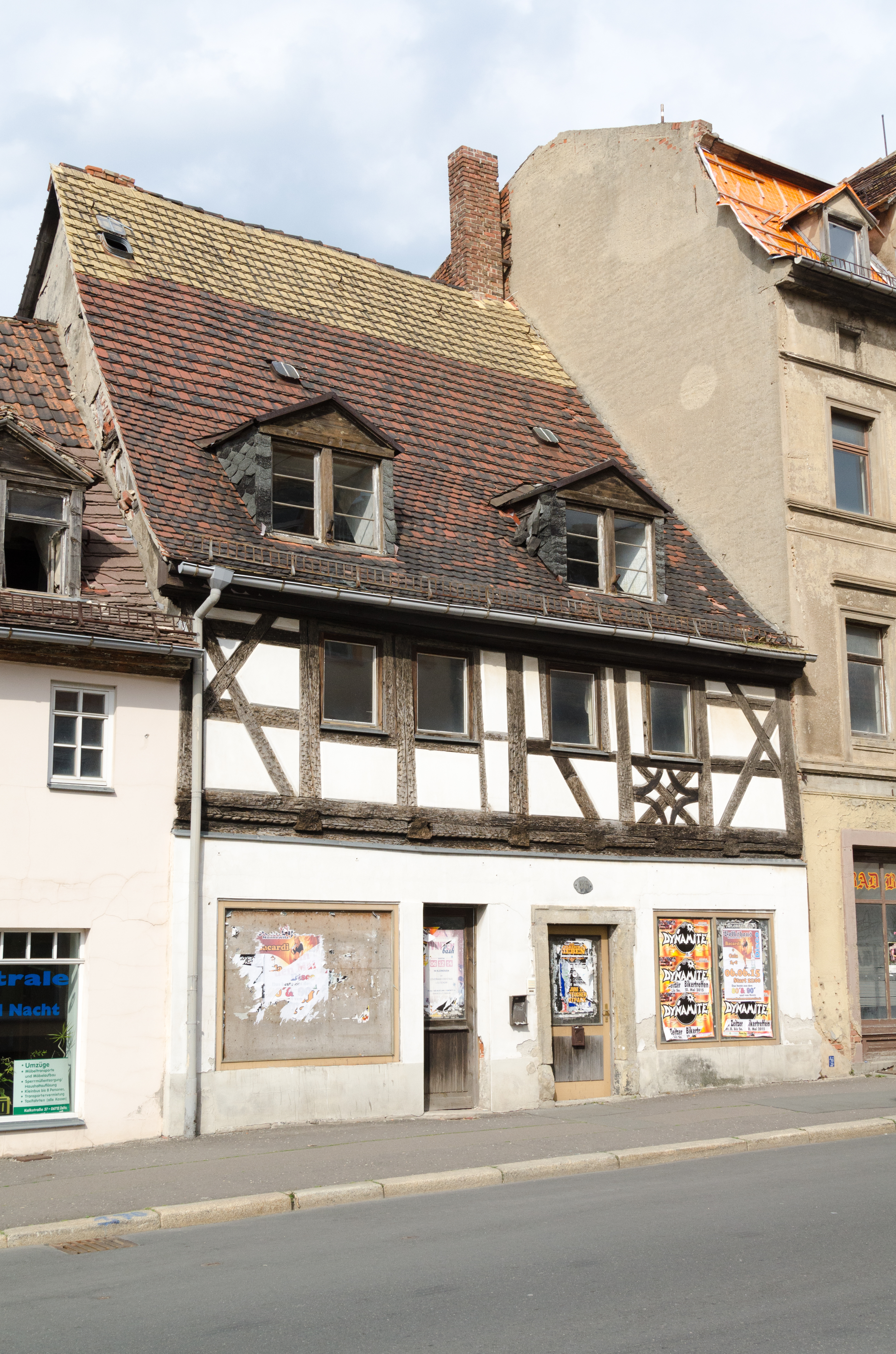 Zeitz, Kalkstraße 36